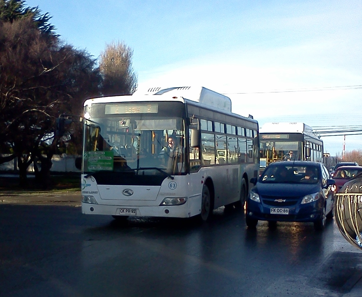 bus cruzando av. bulnes